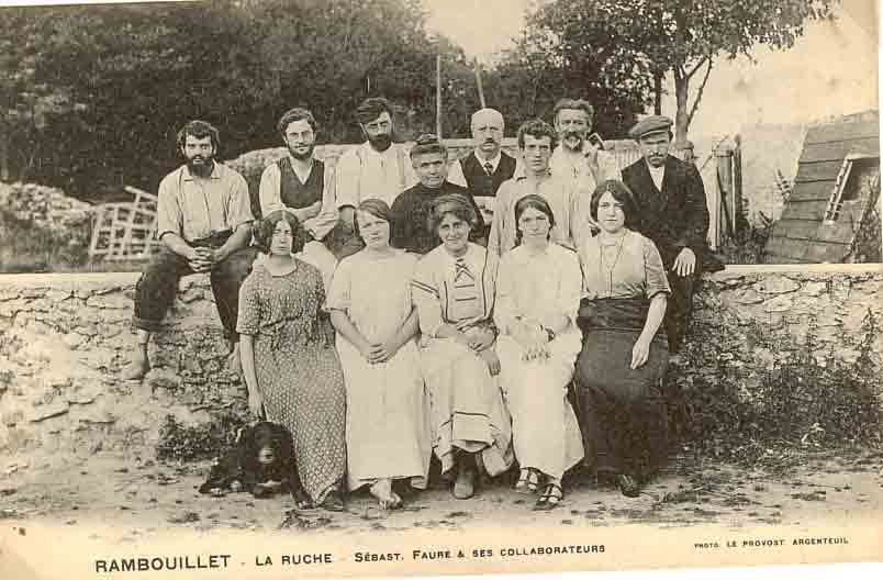 La Ruche est une école libertaire et un espace de vie communautaire fonctionnant selon le concept de coopérative intégrale. Fondée en 1904, à Rambouillet (Yvelines), par Sébastien Faure, elle disparait durant l'hiver 1917 suite aux restrictions imposée par la Première Guerre mondiale.